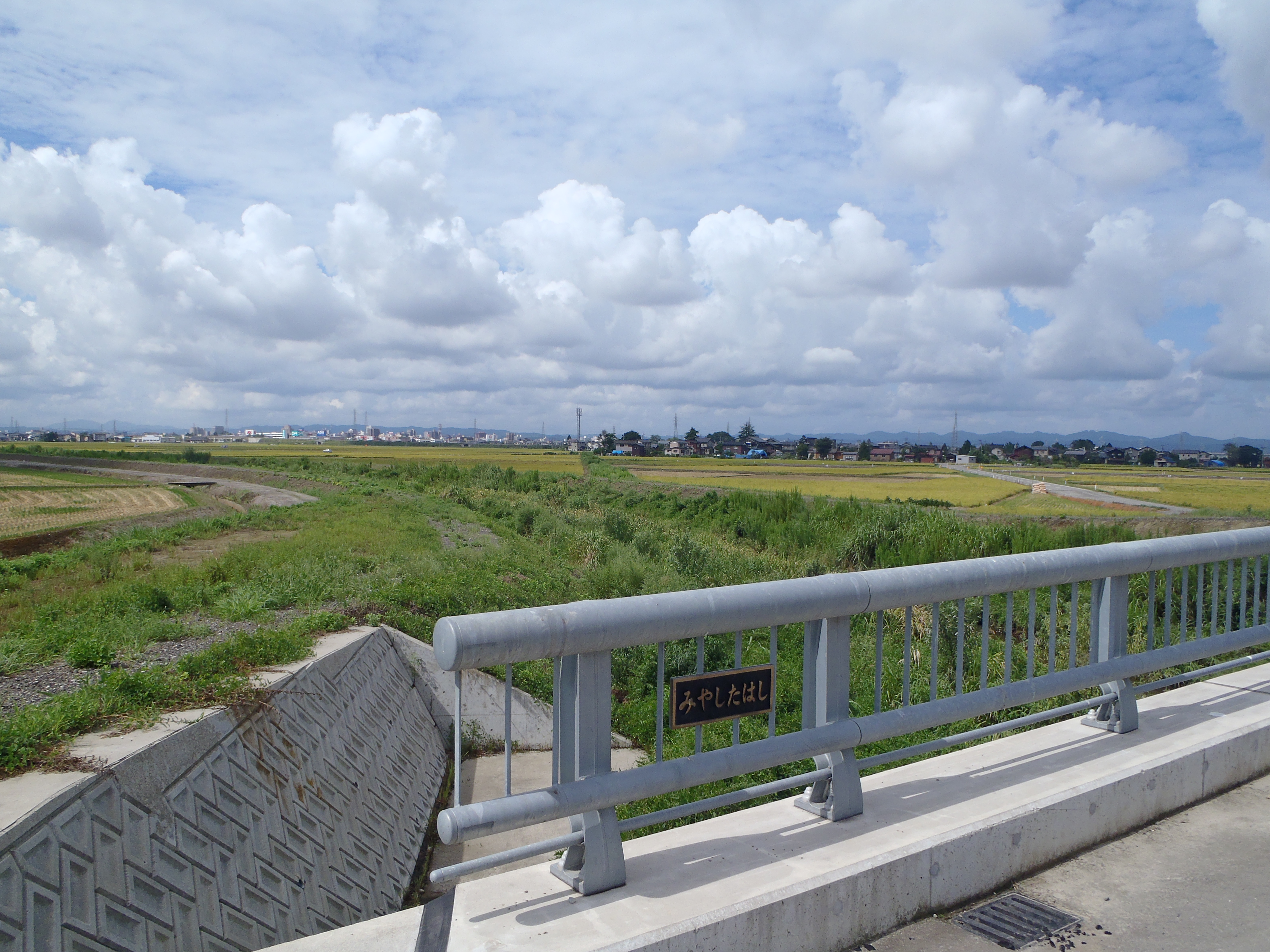 栃尾鉄道宮下駅跡。川の拡幅で駅跡は消滅。ちょうど橋から見下ろしたあたりにホームがあった。